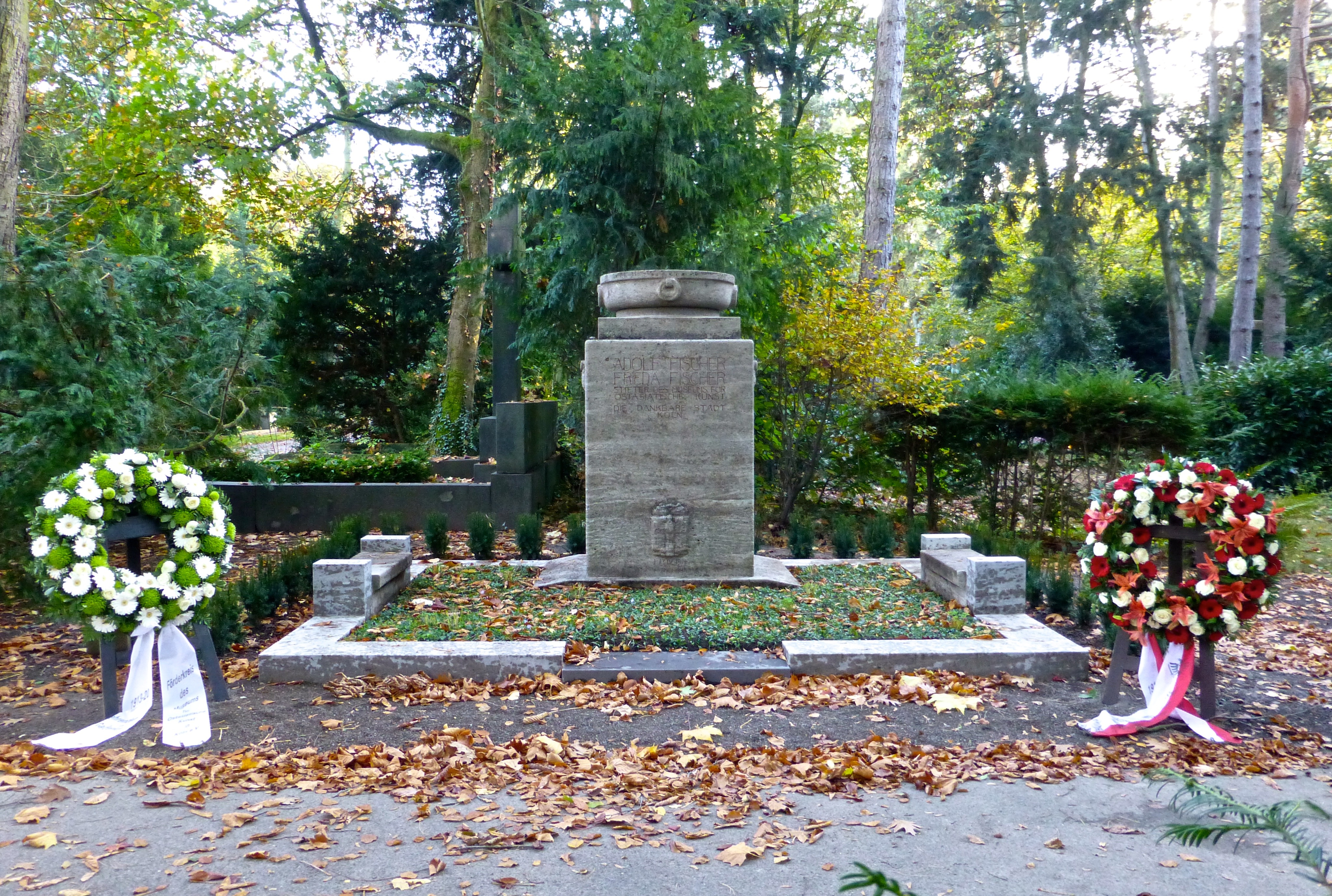 Friedhof Melaten (Köln): Grabanlage Adolf und Frieda Fischer (Flur 76 A), entworfen von Georg Grasegger